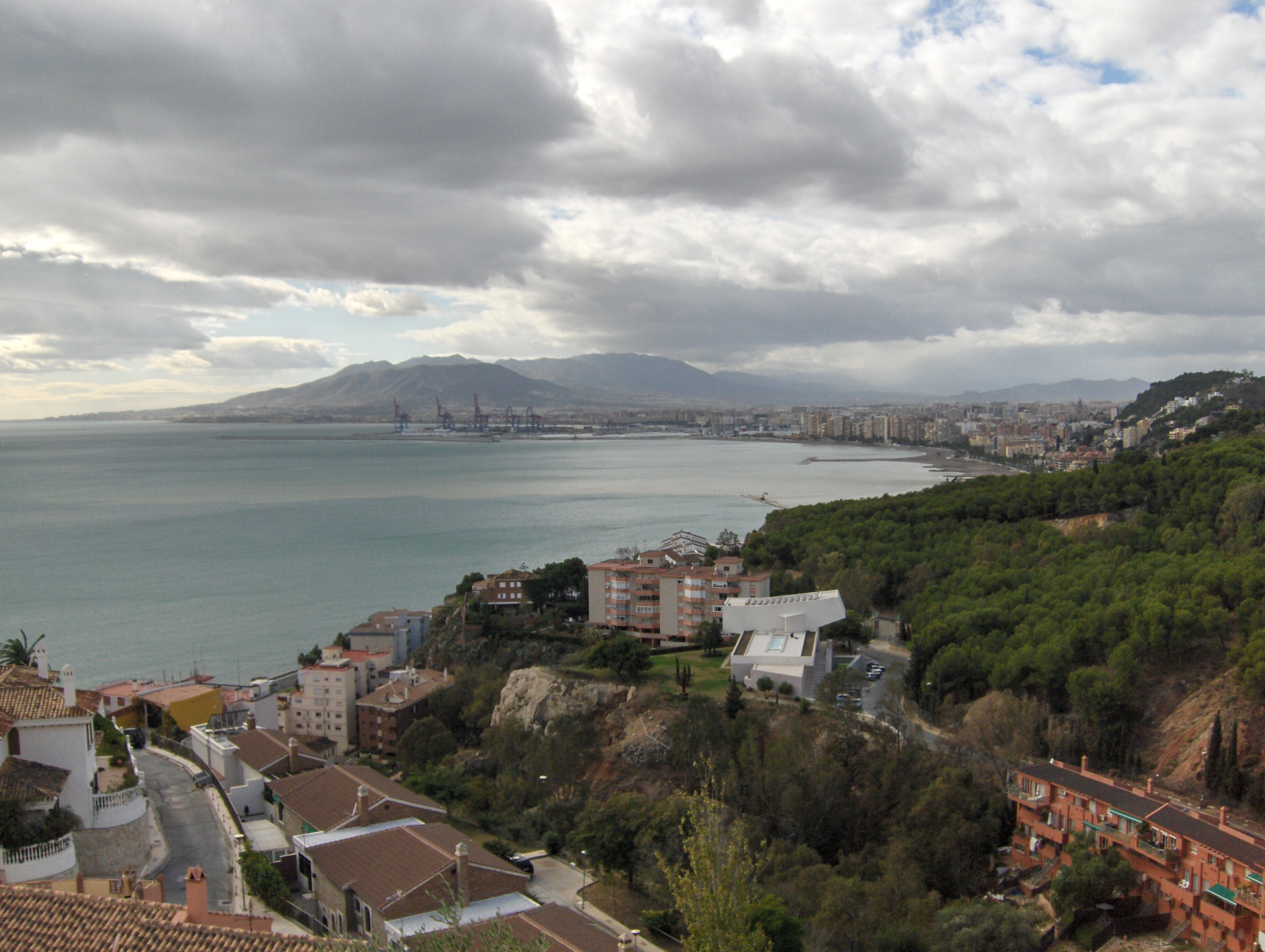 Observatorio de Medio Ambiente Urbano de Málaga, España.